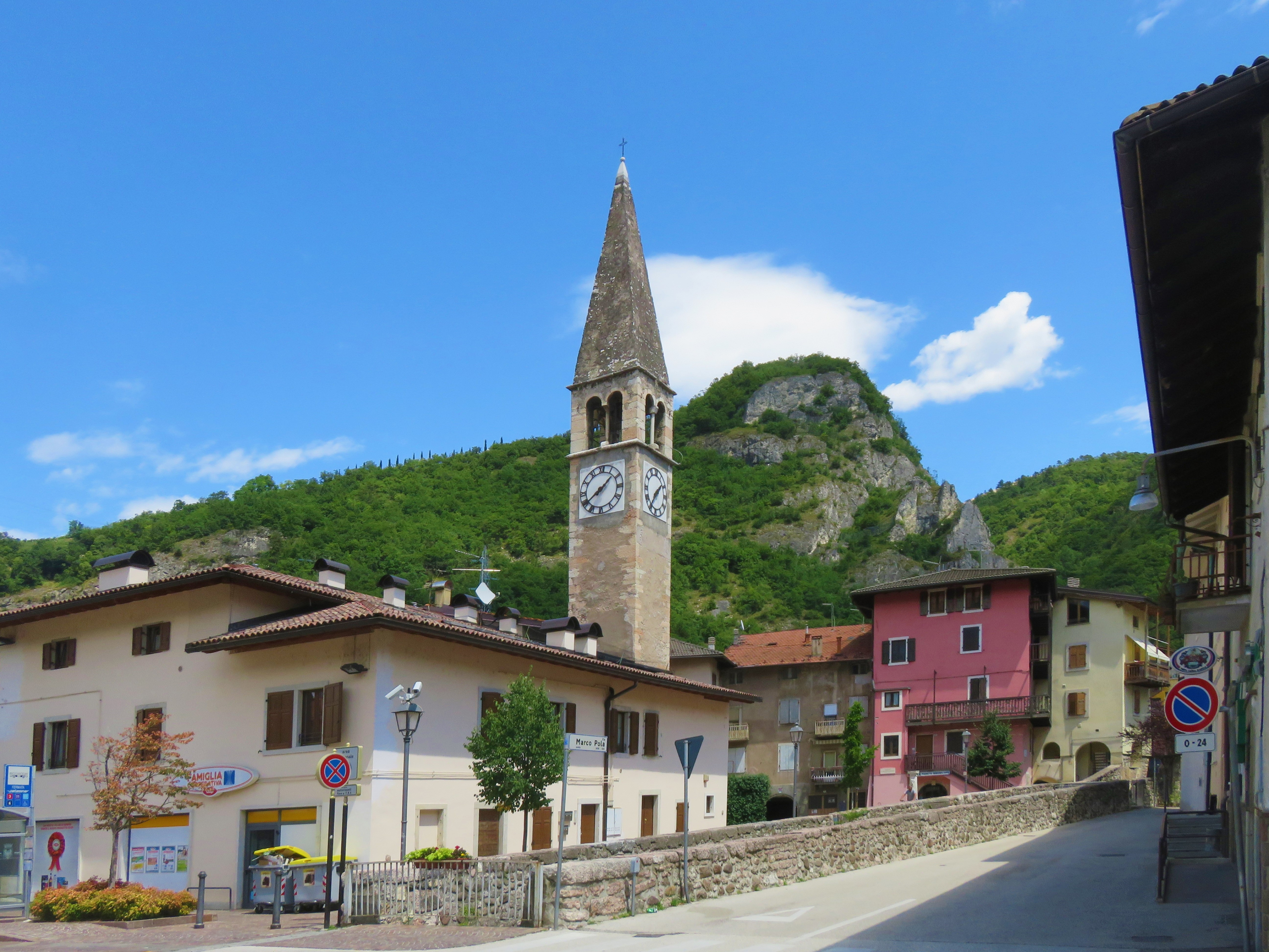 Campanile della vecchia chiesa di Gardolo. L'antica chiesa è stata demolita da secoli ma il campanile è rimasto a lungo il solo campanile del paese. Solo nel 1925 è stato eretto il nuovo campanile della chiesa della Visitazione di Maria Santissima.